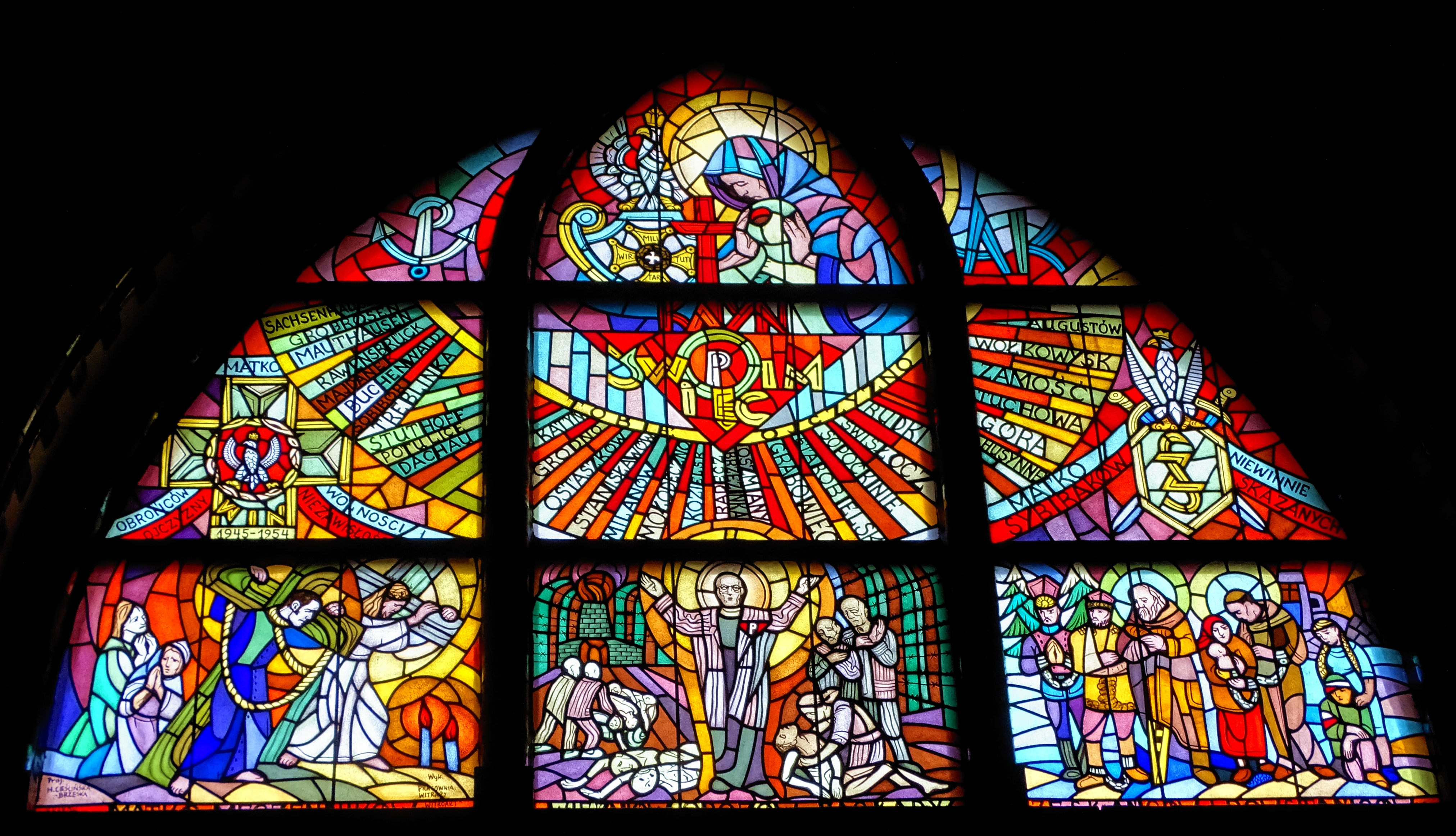 Witraż projektu Haliny Cieślińskiej-Brzeskiej, wykonała pracownia Witroart, Piotr Janek. Kościół św. Elżbiety, Wrocław, Grabiszyńska.